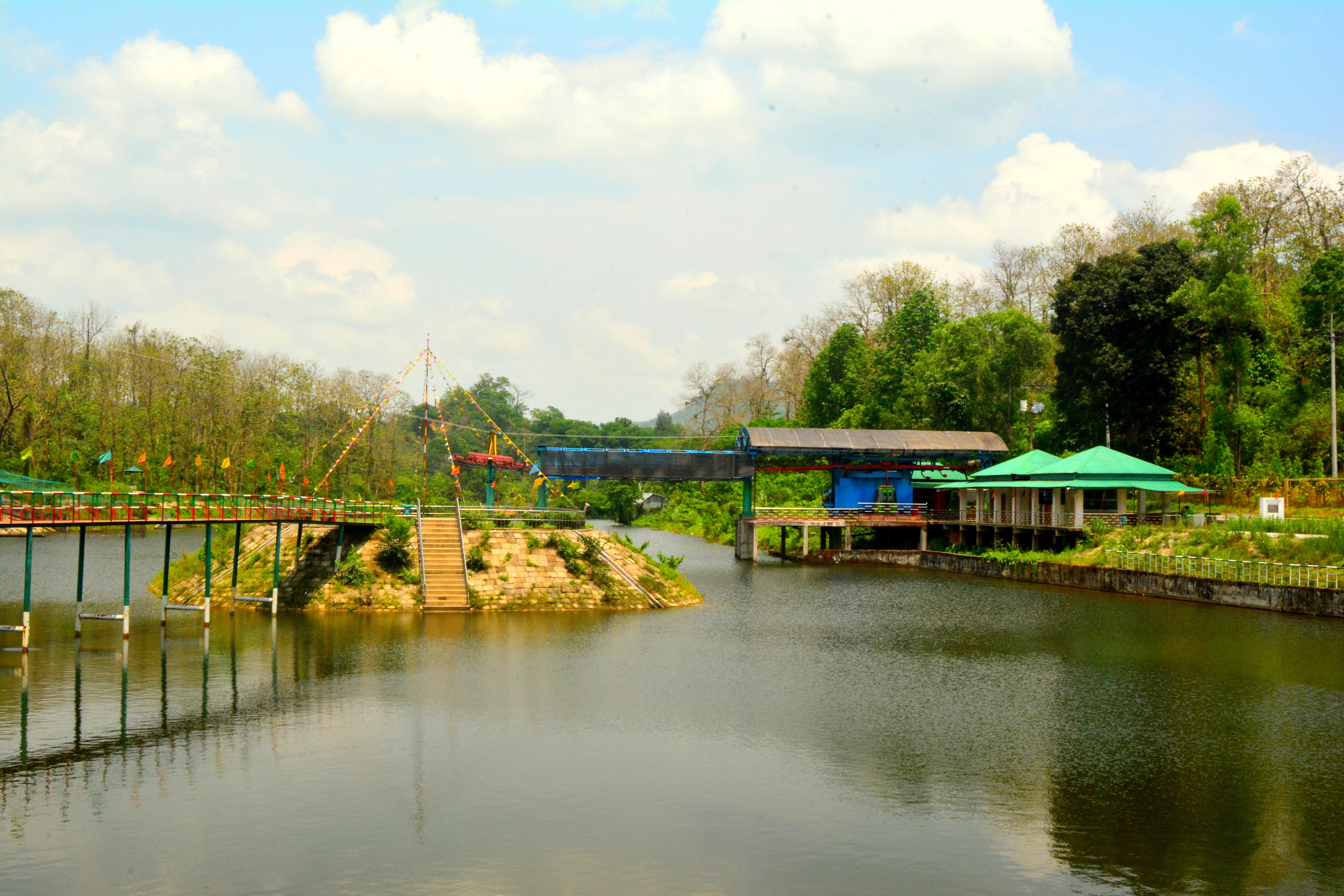 শেখ রাসেল পক্ষিশালা এবং ইকোপার্ক